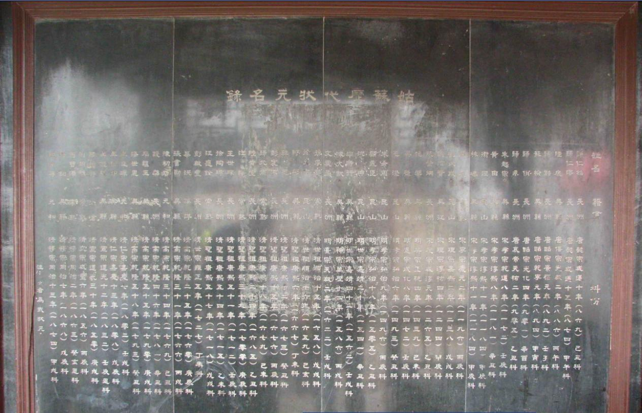 苏州南浩街上的苏州历代状元碑，见苏州状元。作者电脑里原始件有1张，传到猫扑网站上1张、百度贴吧苏州吧1张（引用自猫扑）、维库有1张。